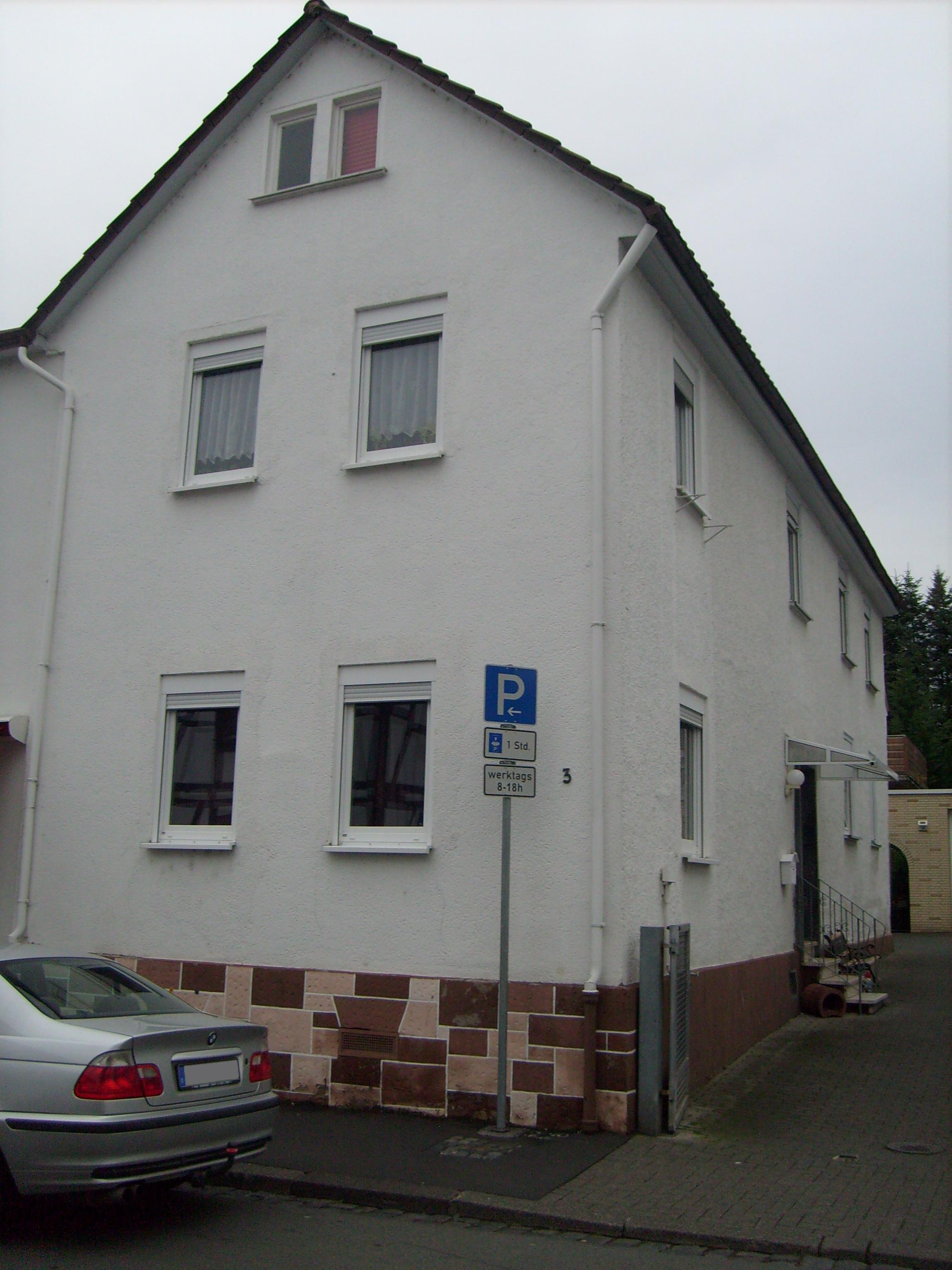 Gießen-Wieseck Karl-Benner-Straße 3